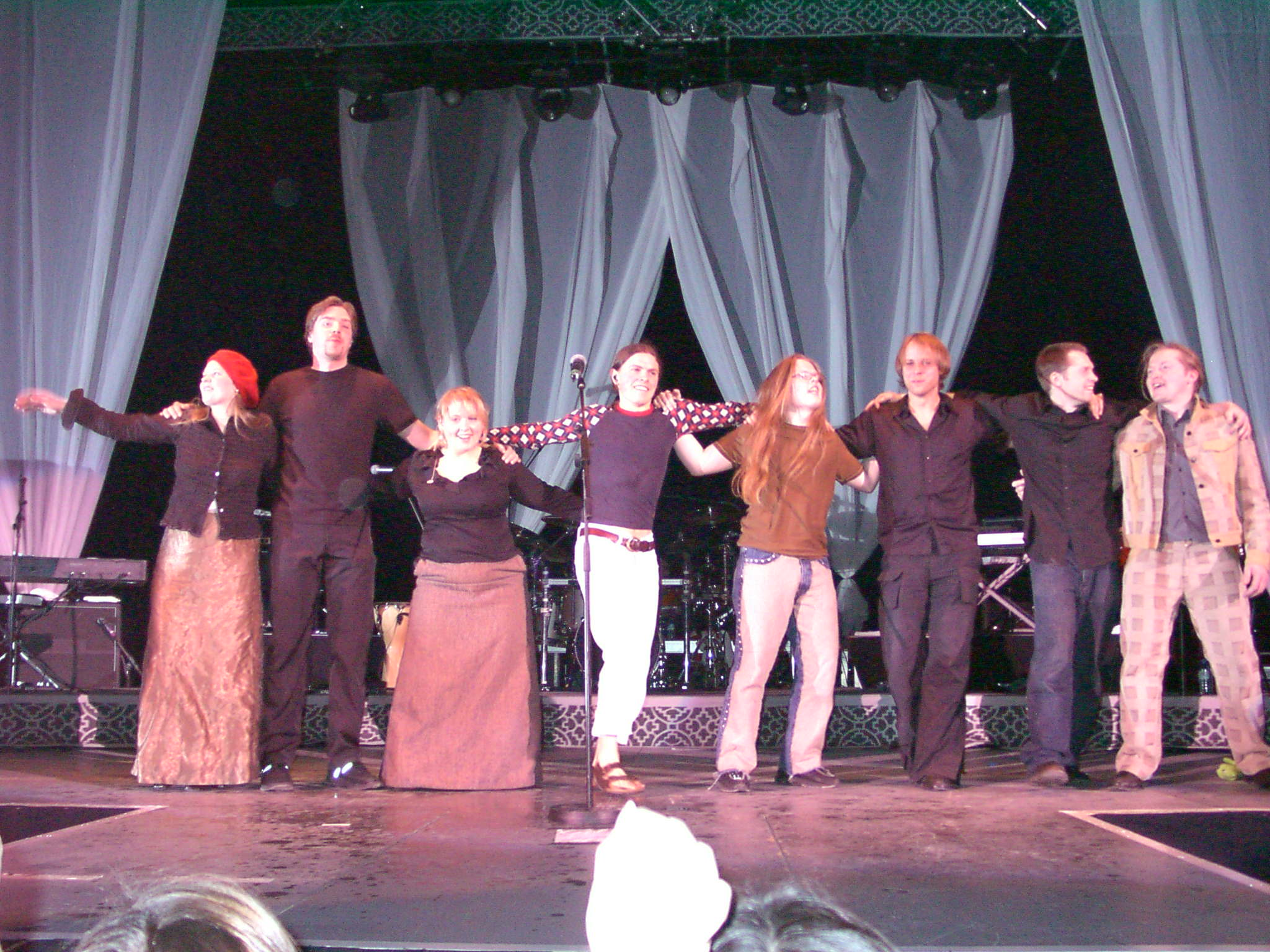 The Kelly Family, München, Olympiahalle